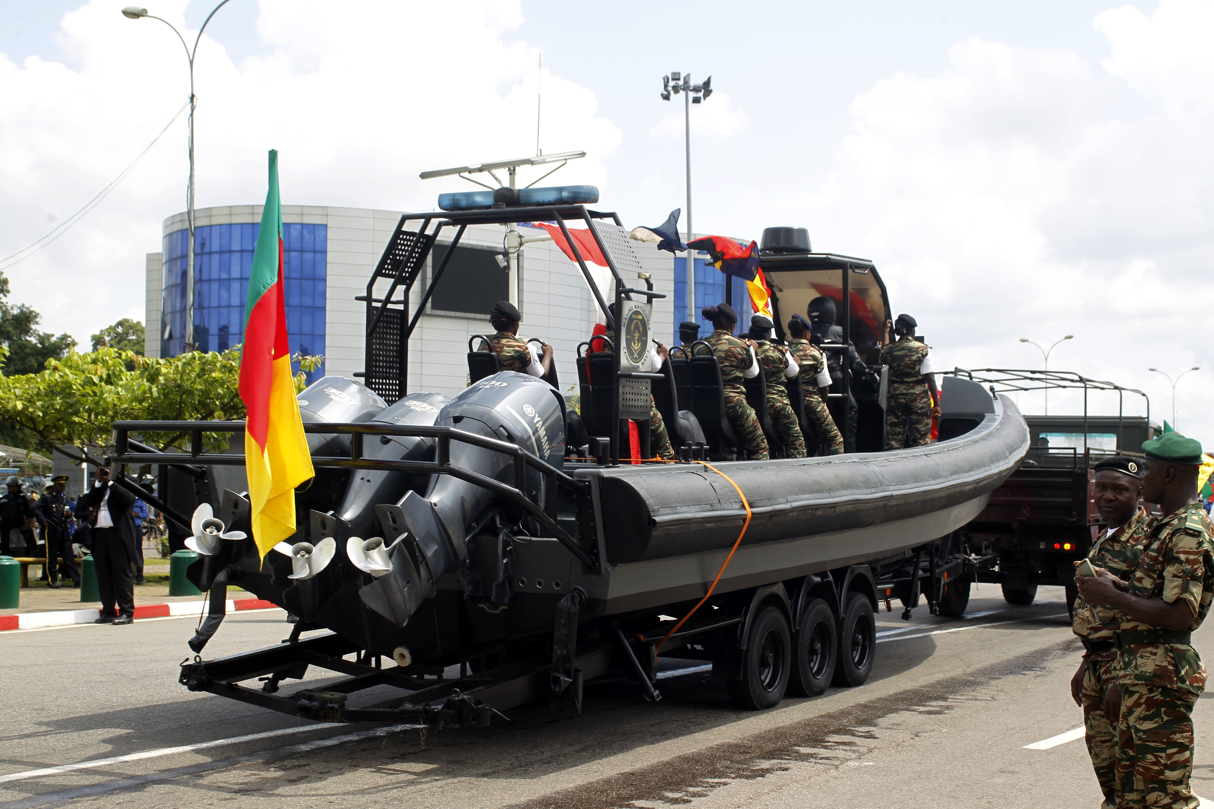 véhicules transportant le matériel militaire pendant le défilé de la fête national du Cameroun le 20 mai 2019. This is an image with the theme "Africa on the Move or Transport" from: Cameroon